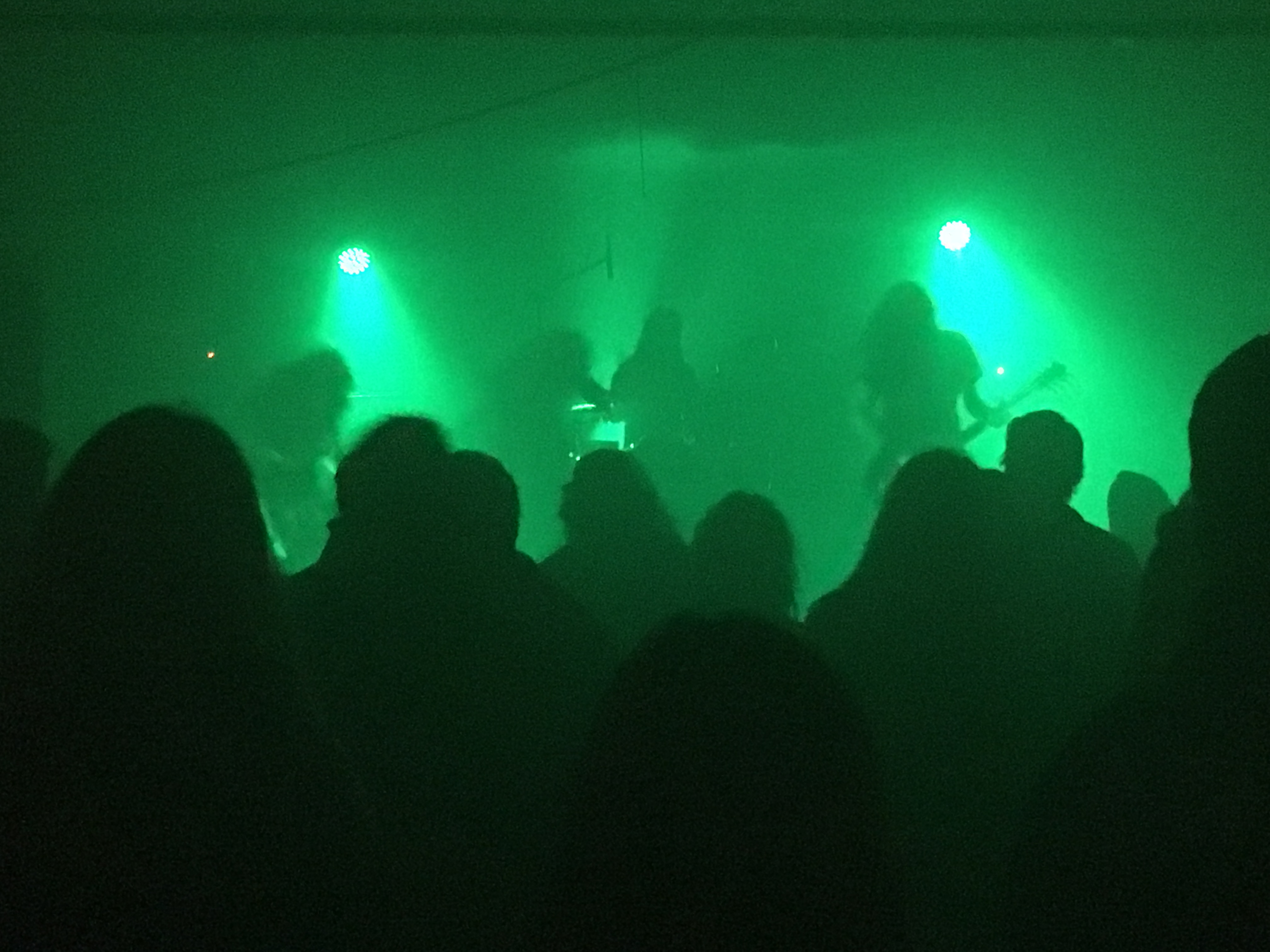 Belzebong novembra 2018 v Ljubljani